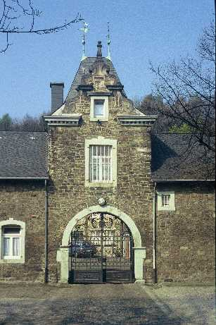 Kupferhof Weide in Stolberg (Rhld.)